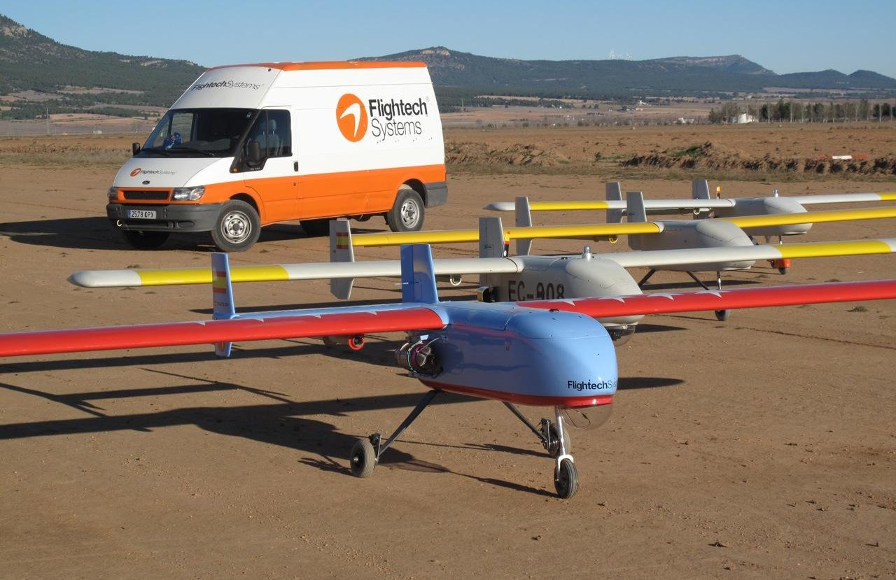 Flota de FT-ALTEA y una Unidad Móvil